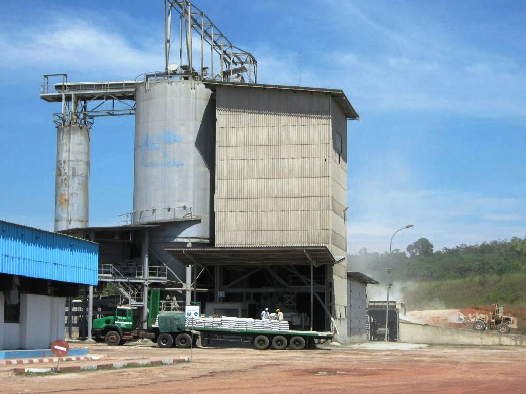 L'exploitation de la roche de ciment est la principe industrie de la ville de Ntoum